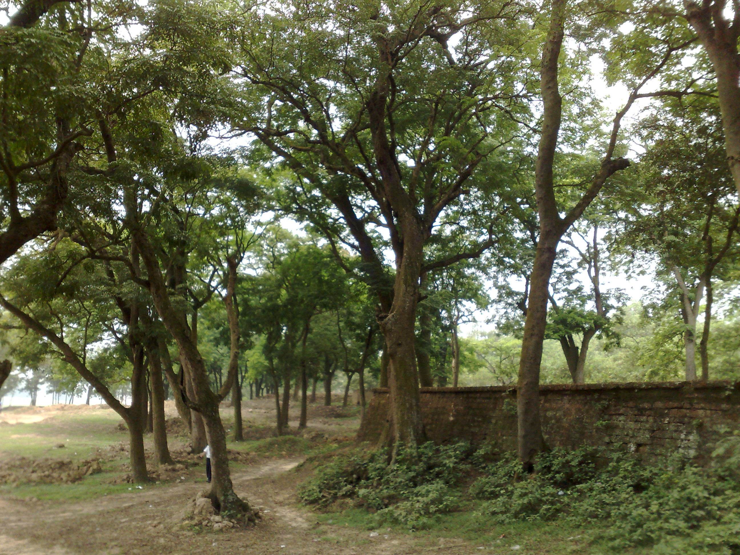 Rừng lim đền Và (TX. Sơn Tây, Hà Tây) do tôi tự chụp và tải lên để minh hoạ cho bài viết Đền Và.